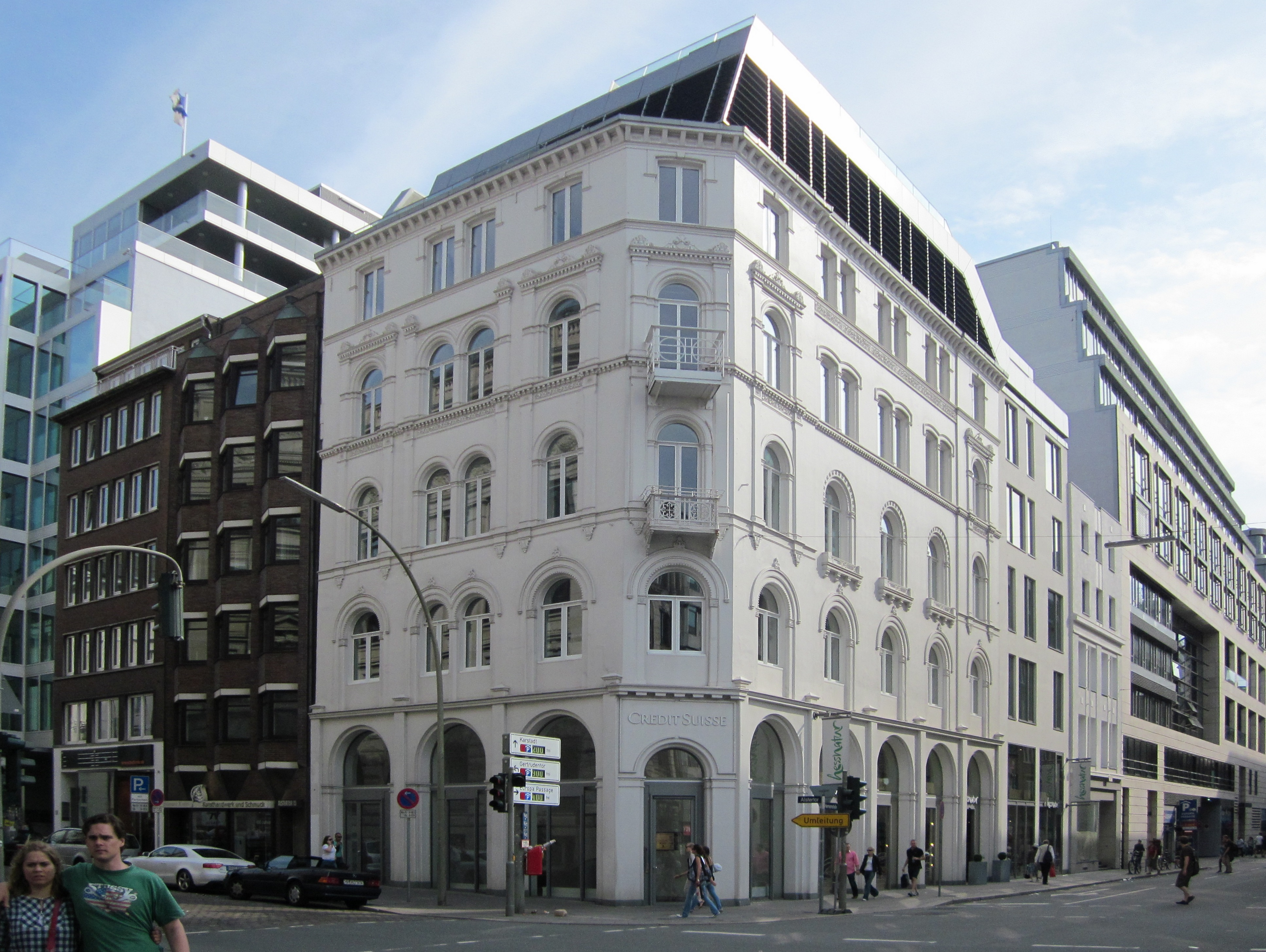 Das Haus Alstertor 17 in Hamburg-Altstadt wurde nach 1842 im Zuge des Wiederaufbaus nach dem Hamburger Brand errichtet. Heute beherbergt es die Hamburger Filiale der Schweizer Bank Credit Suisse. Es wurde am 16. August 1977 unter Denkmalschutz gestellt. This is a photograph of an architectural monument.